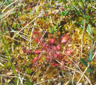 Saulašarė - Drosera Foto: Algirdas